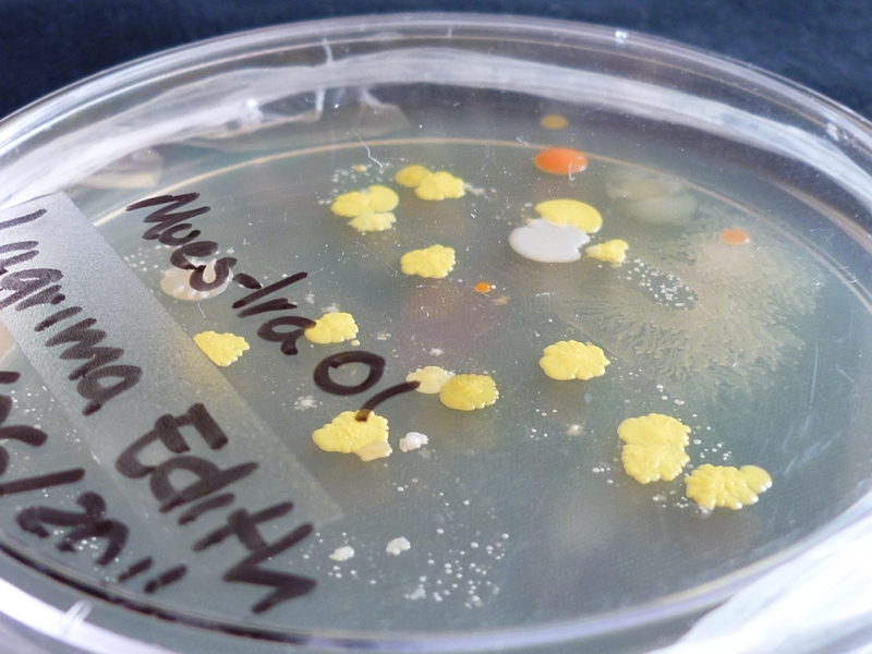 "Cultivo de Lágrimas" (2012) proceso de cultivo (Foto_@EdithMedina)